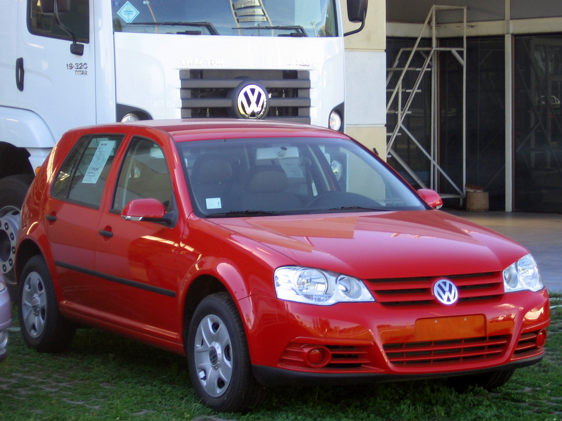 brazilian Golf